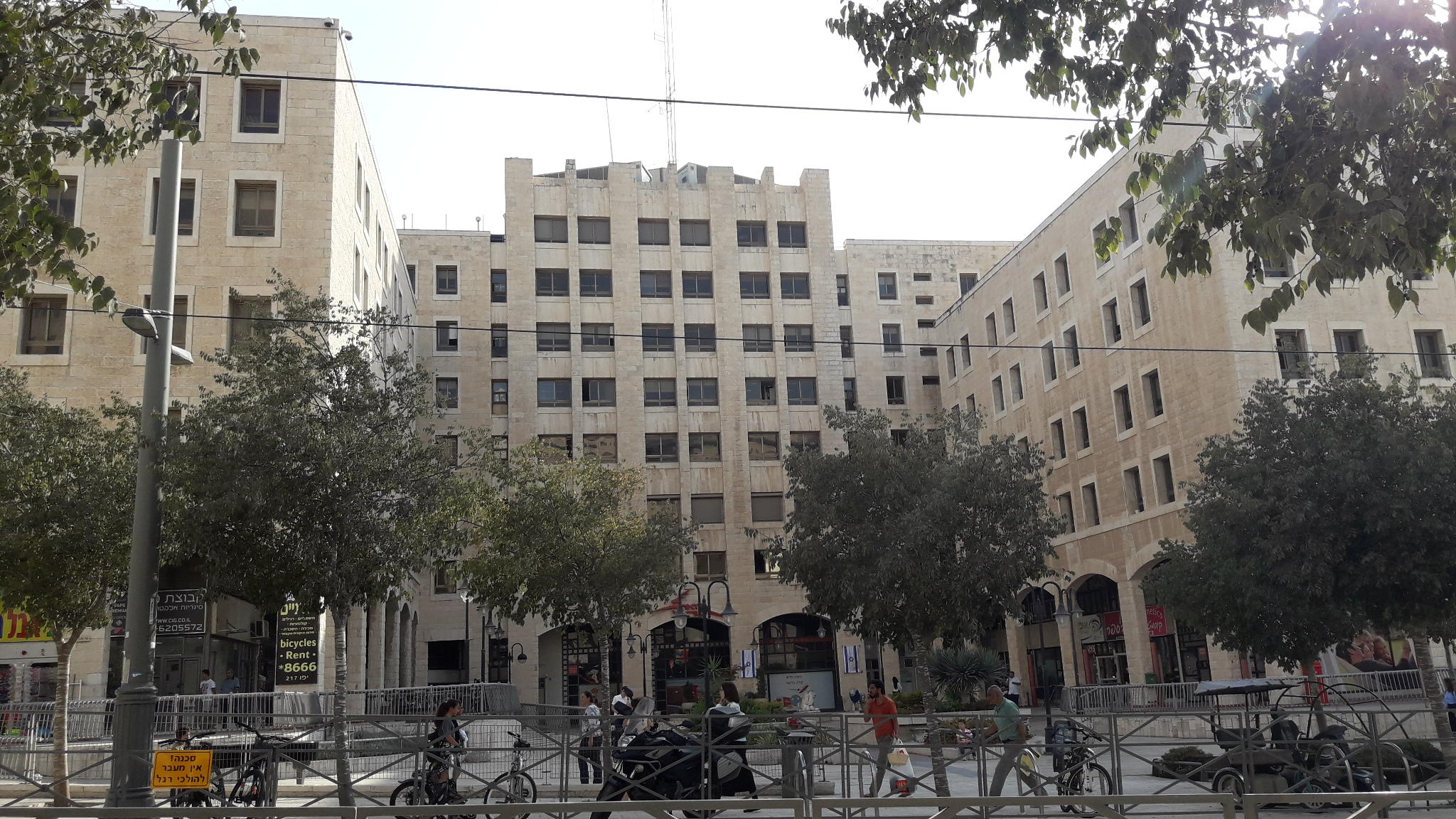 בית הנהלת רשות הדואר - ירושלים